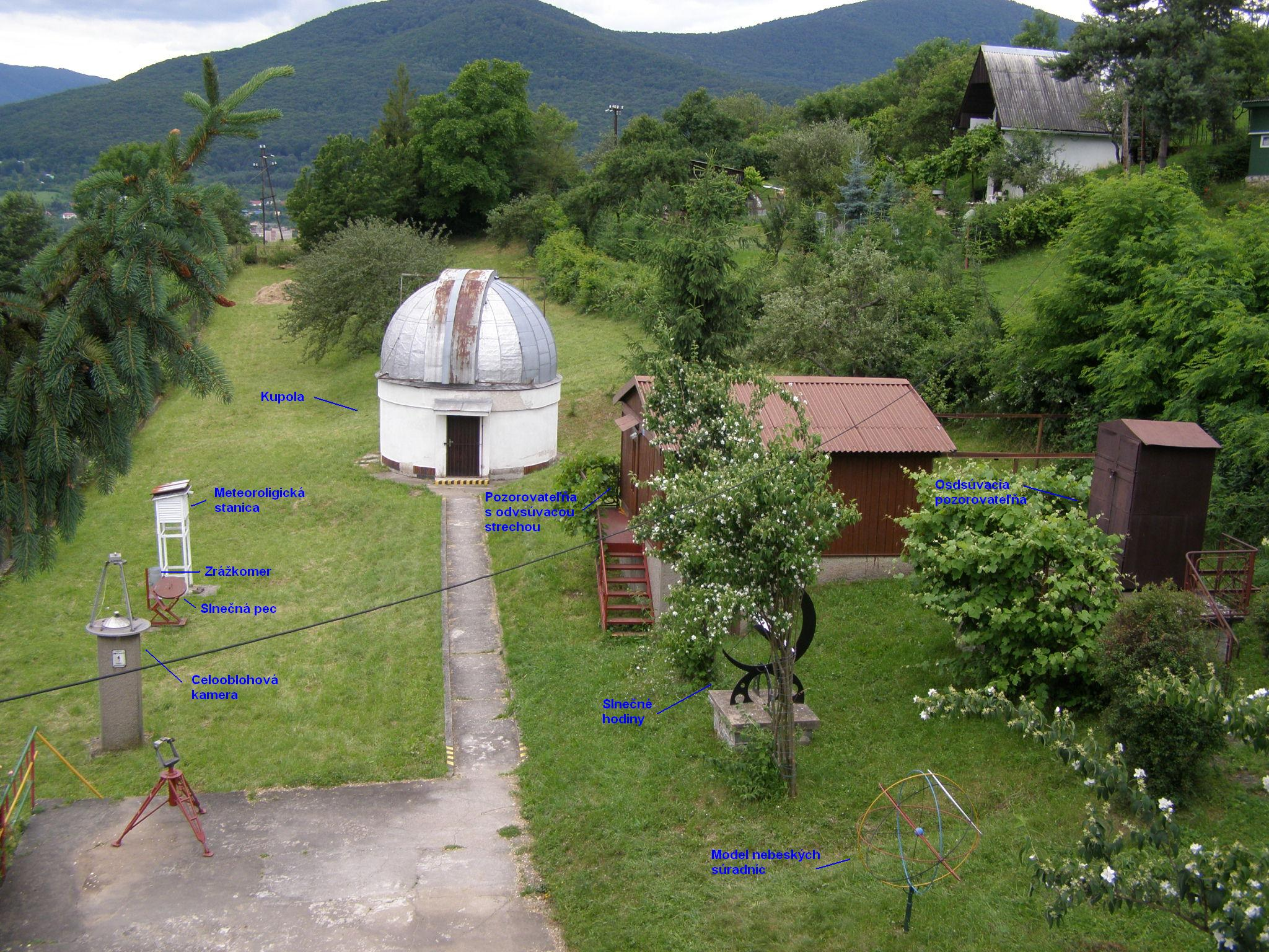 areál rožňavskej hvezdárne, odsúvacie pozorovateľne, kupola, meteostanica, slnečná pec, celooblohová kamera. Latitude 48°40´14,816´´ N longitude 20°32´10,864´´ E